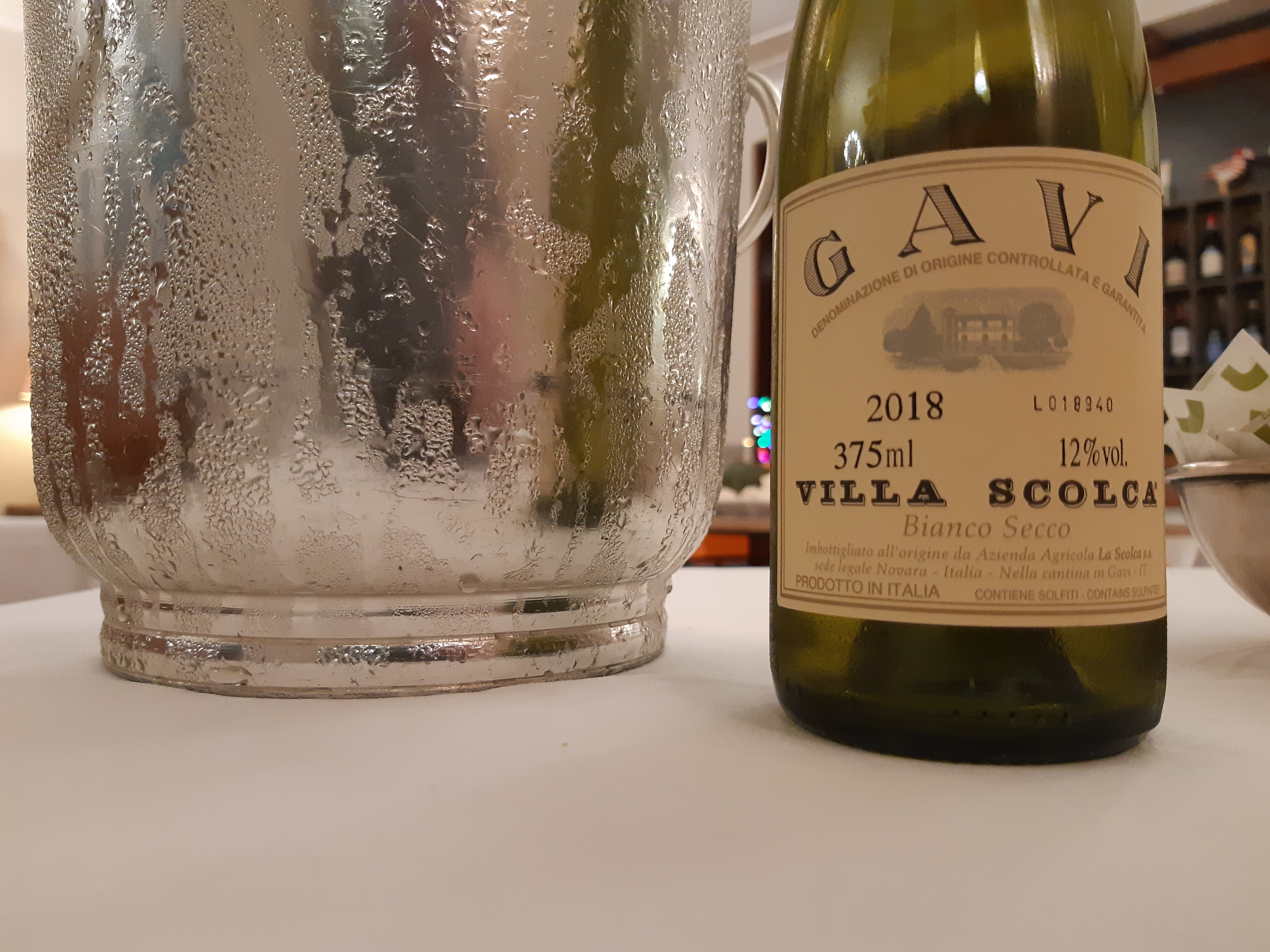 Villa Scolca von La Scolca Gavi (Italy) 2019